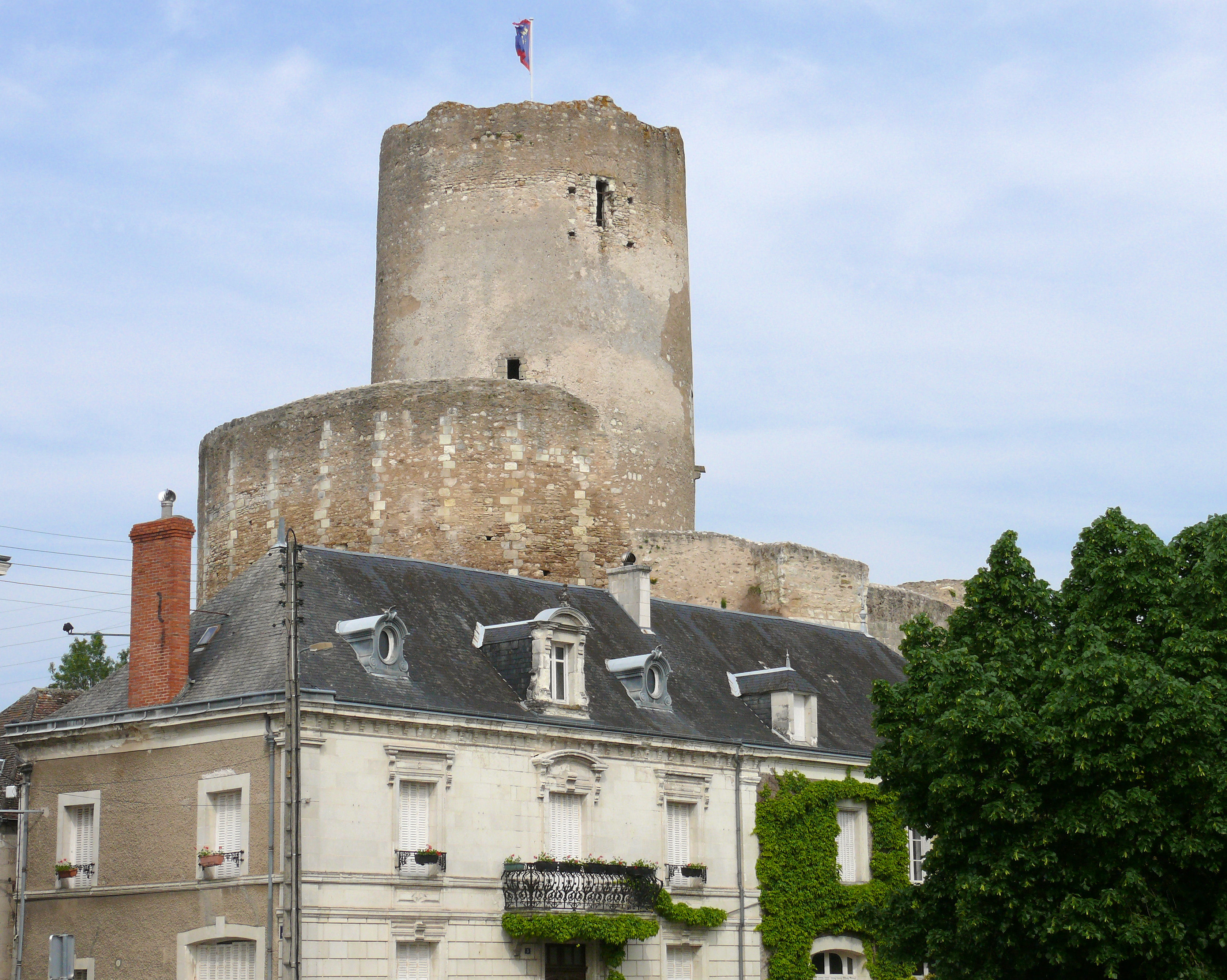 Châtillon-sur-Indre - Donjon du château